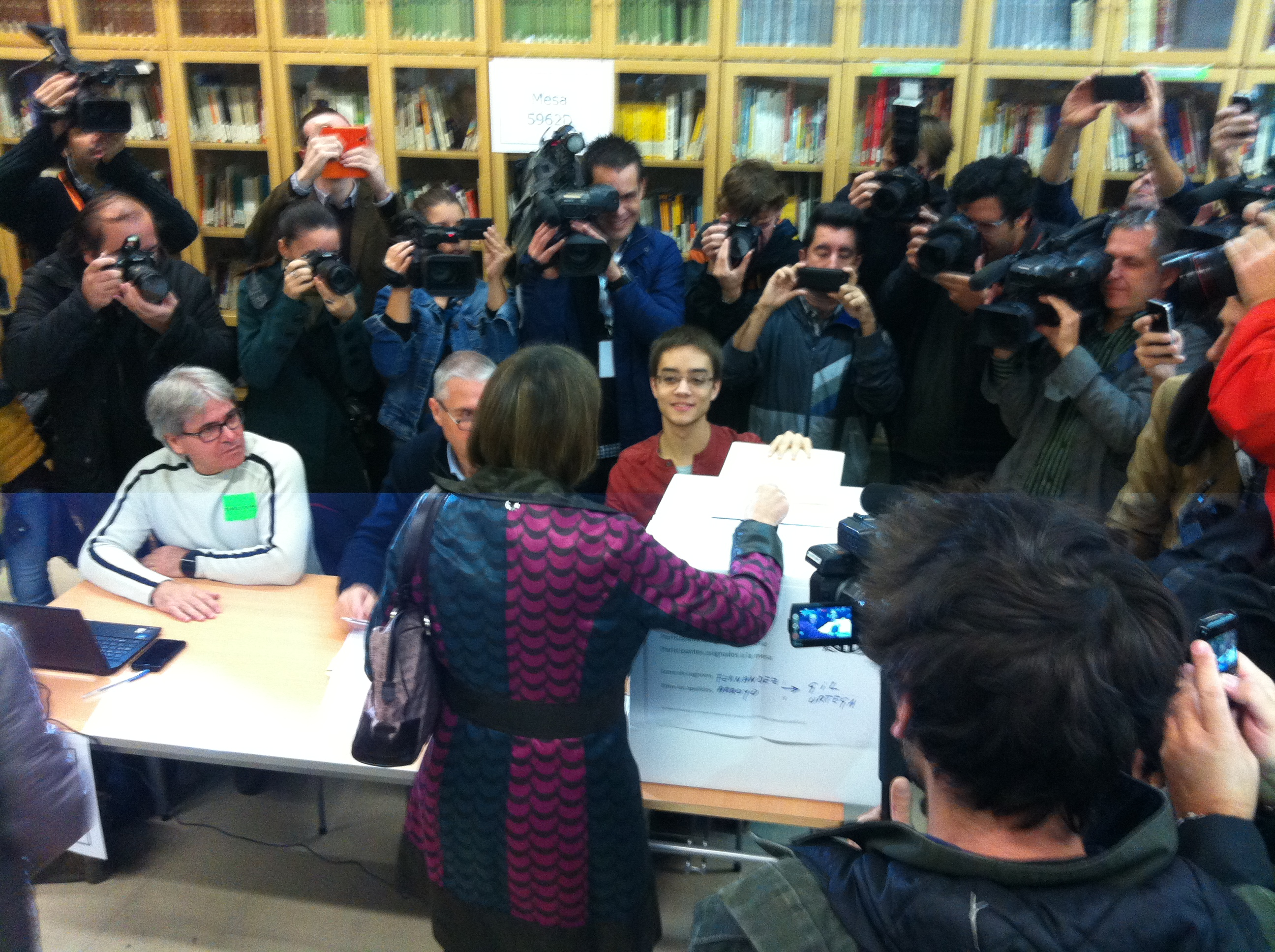 Carme Forcadell voting, 9N2014